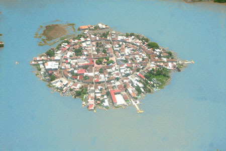 Mexcaltitan